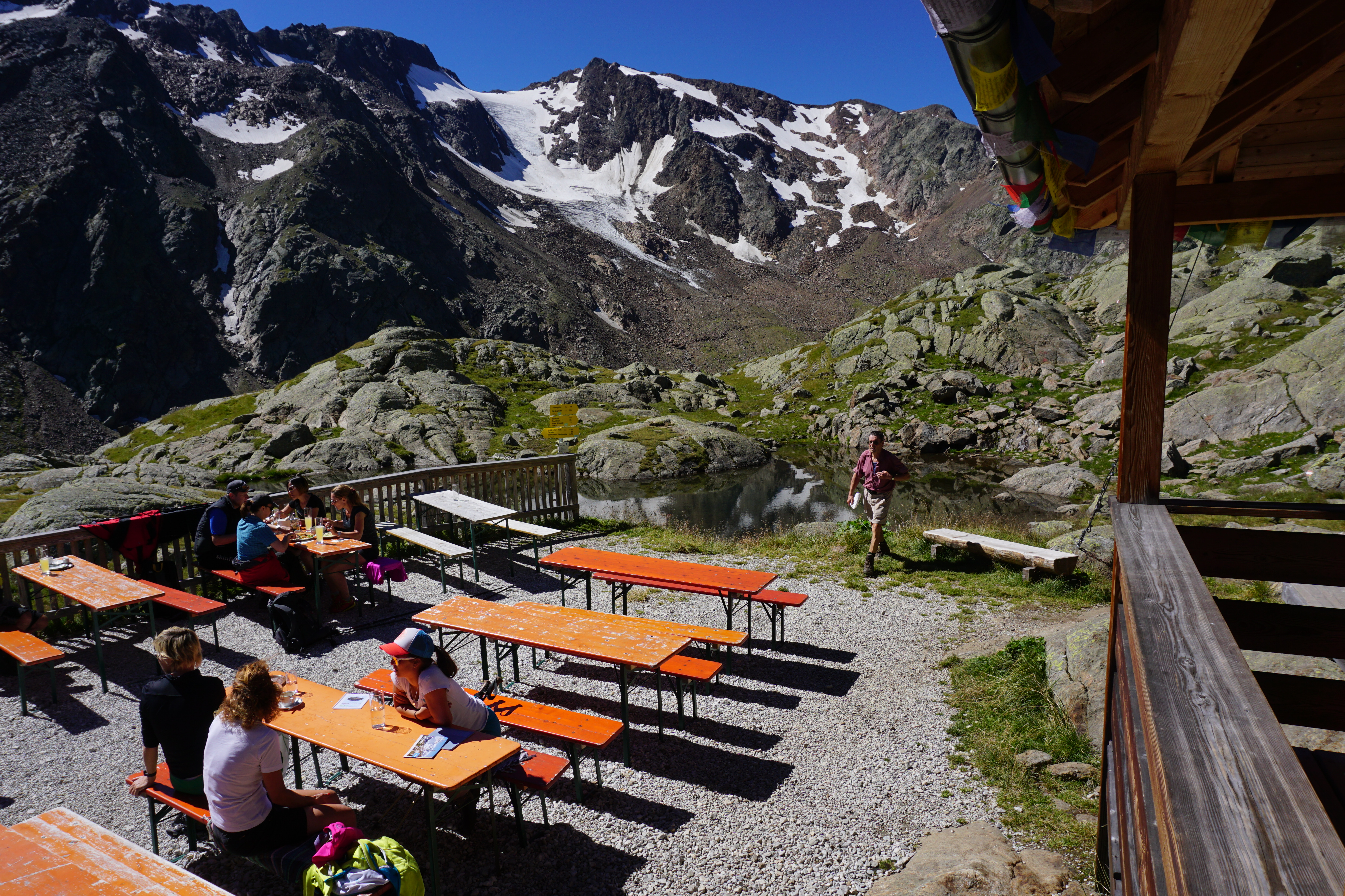 Terrasse der Bremer Hütte